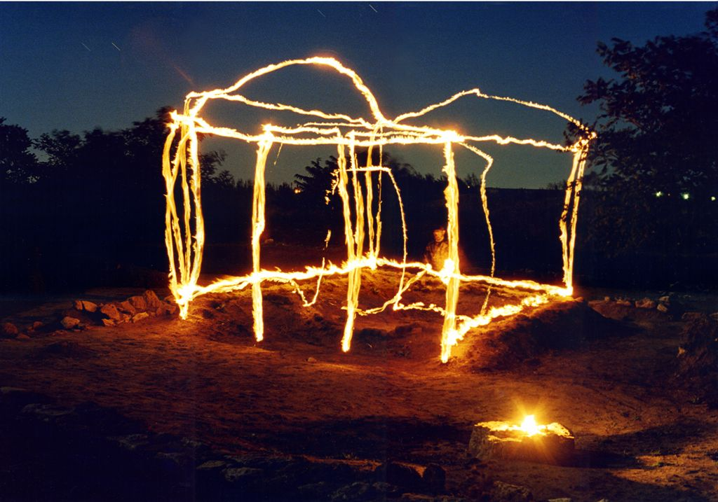 Фотография исторической реконструкции храма Афродиты В. Бахтова